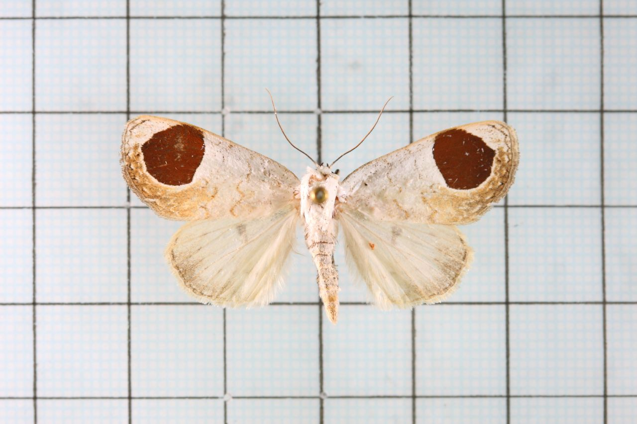 Sphragifera sigillata taimacula Hreblay & Ronkay,2000